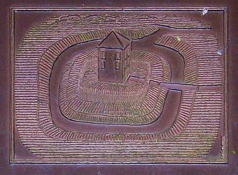 Rekonstruktion der hochmittelalterlichen Rurmhügelburg im Hirschpark Nordkirchen